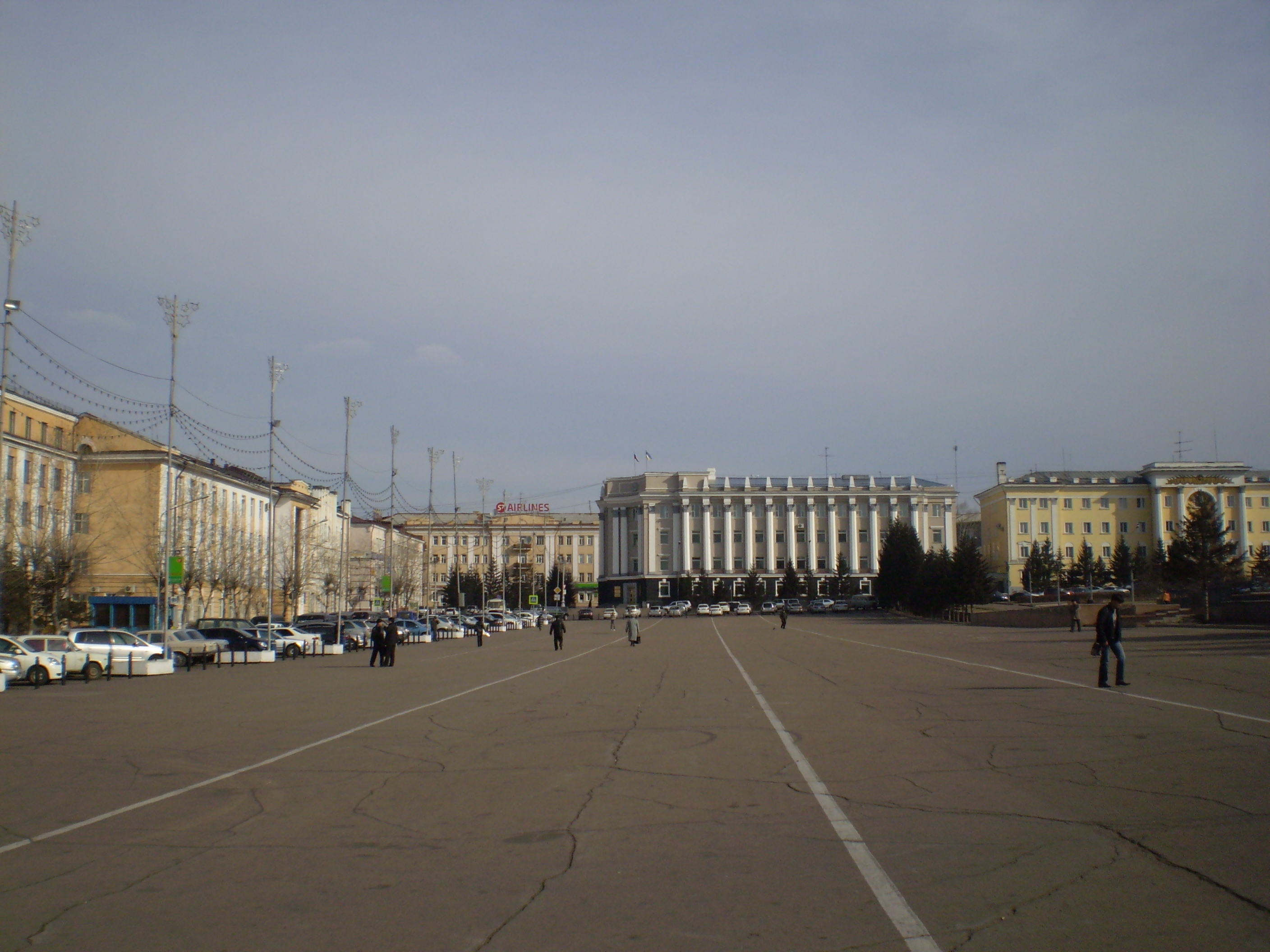 пл. Советов